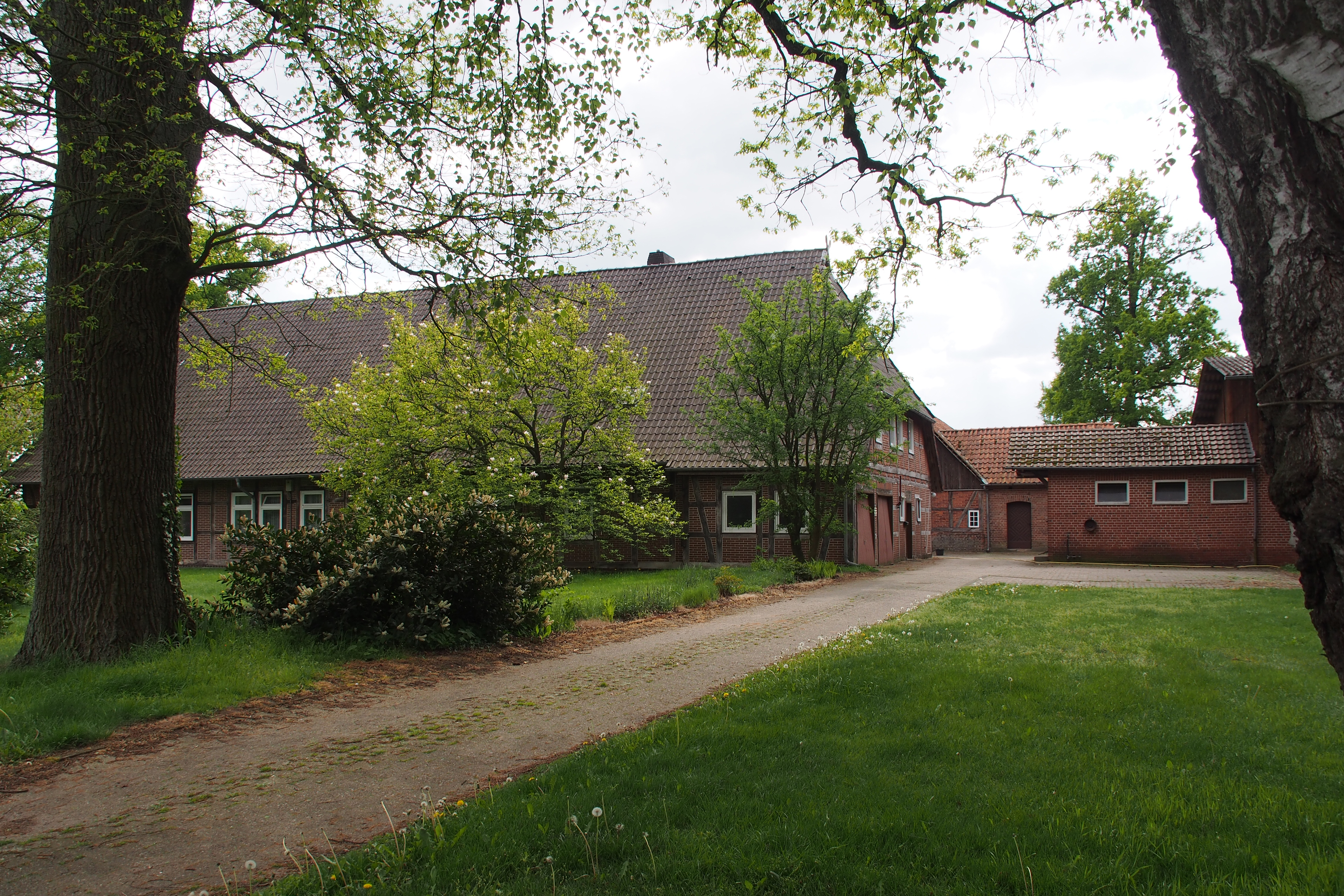 Denkmalgeschützter Bauernhof in Eversen, Stadt Bergen (Niedersachsen)